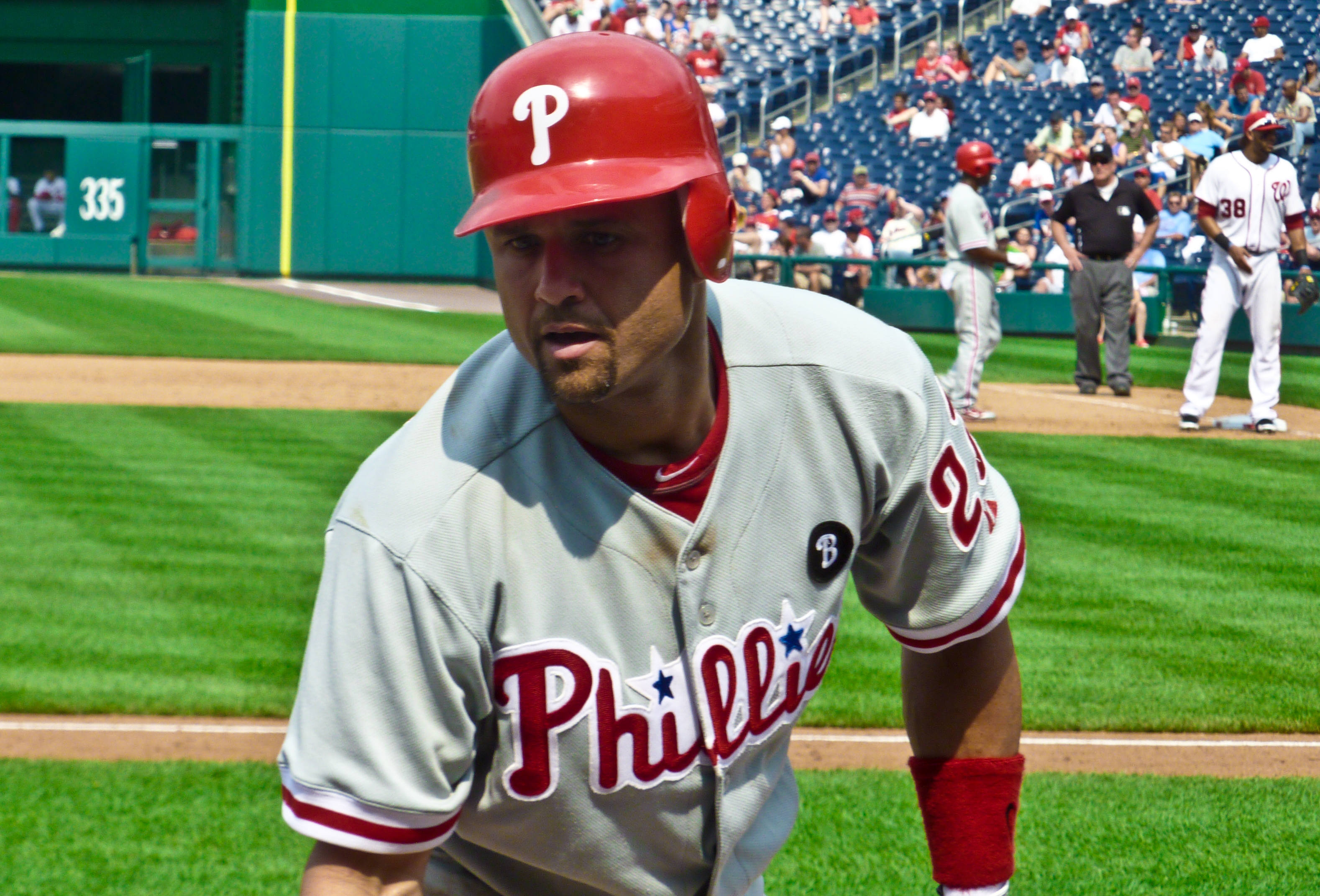 Plácido Polanco